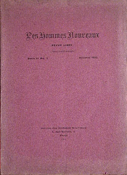 Couverture de la revue Les Hommes Nouveaux - Revue libre de 1913 fondée par Blaise Cendrars ; contributeurs : (photographie), ©éréales Kille® | | ☺ (retouche de l'image). image de base